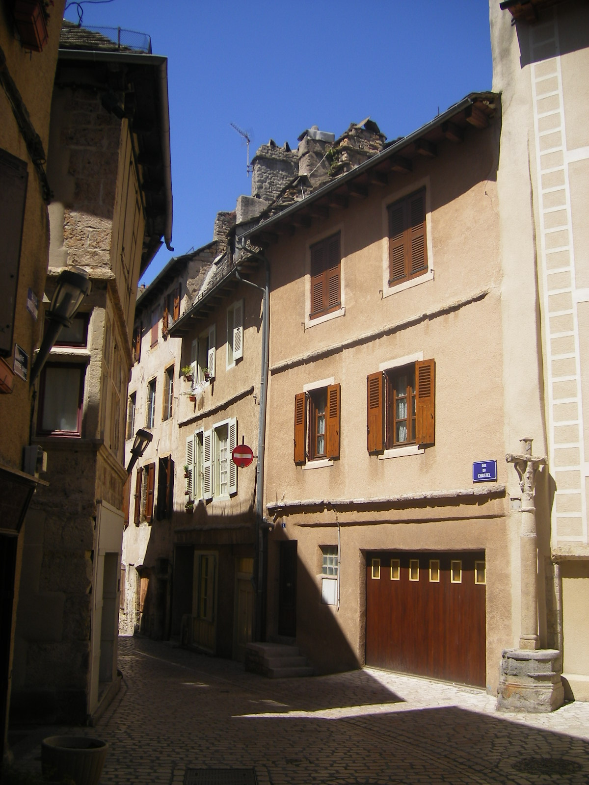 Mende - Rue du Chastel